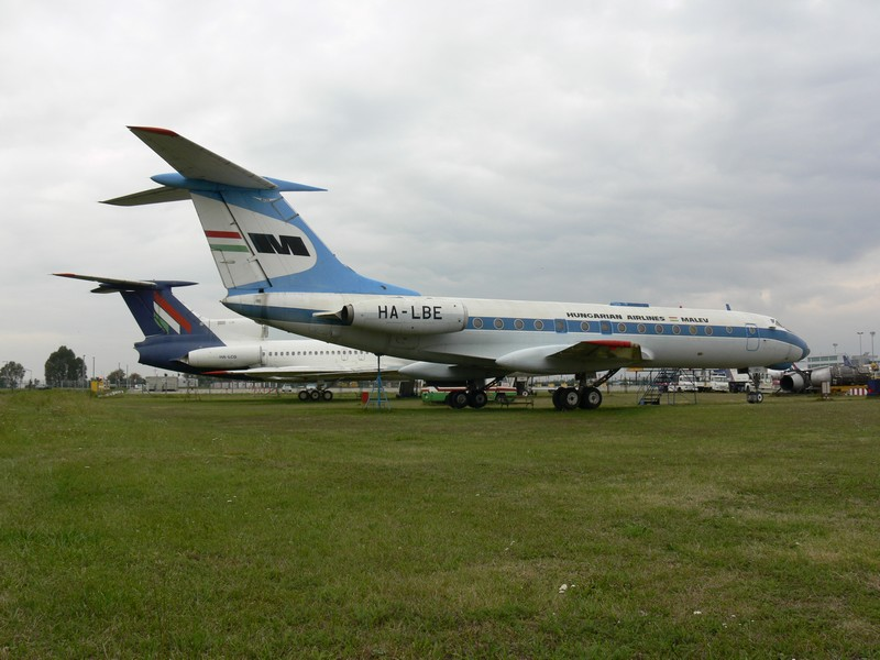 Tupoljev Tu-134 (Ferihegy Repülőgép Emlékpark, Budapest)